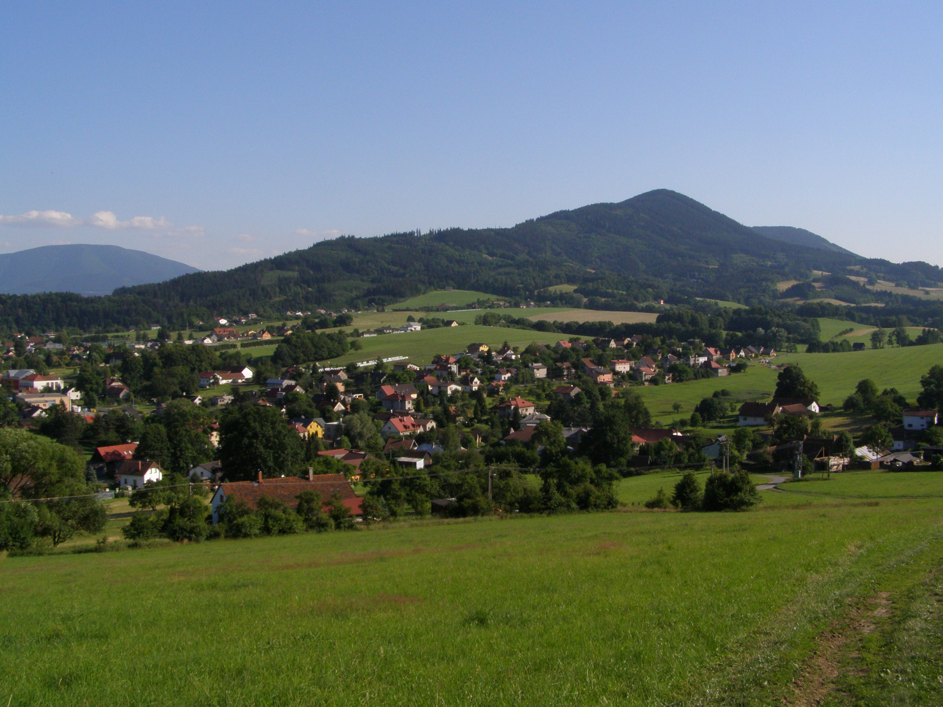 Metylovice, pohled z lokality Lišky na severní stranu vrcholu Ondřejník (890 m)